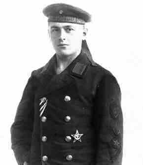 Deutscher Soldat WW I mit dem "Eisernen Halbmond"